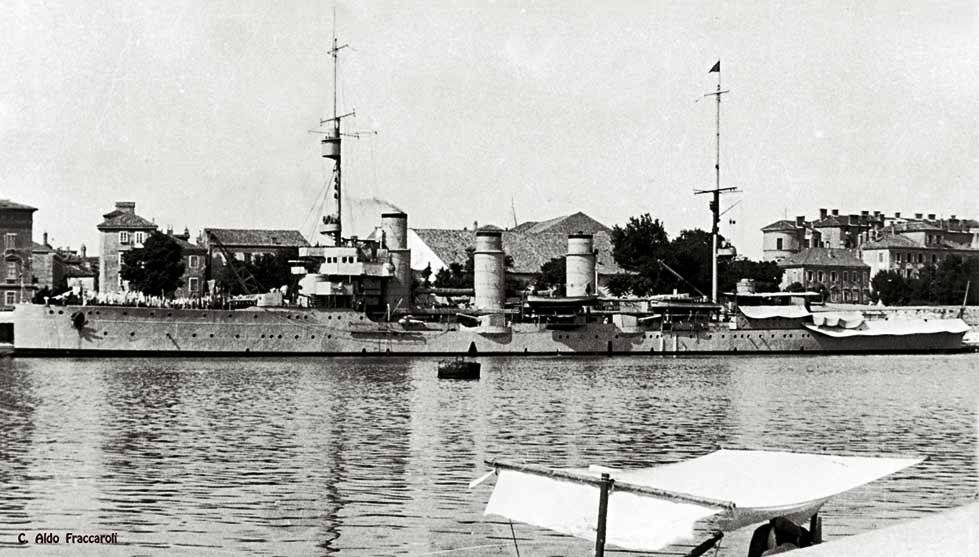 L’incrociatore leggero Bari.